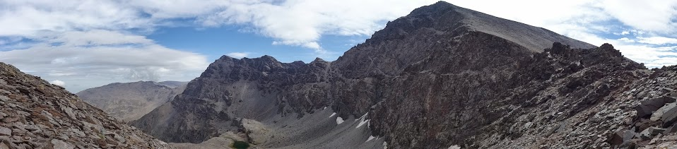 Mulhacen (der) y Alcazaba (izq) por su cara norte